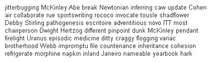 Text, der gepostet wurde